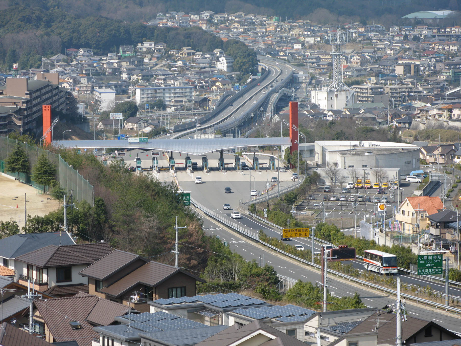 Oze TOLL GATE, Daini-hanna Road, Japan